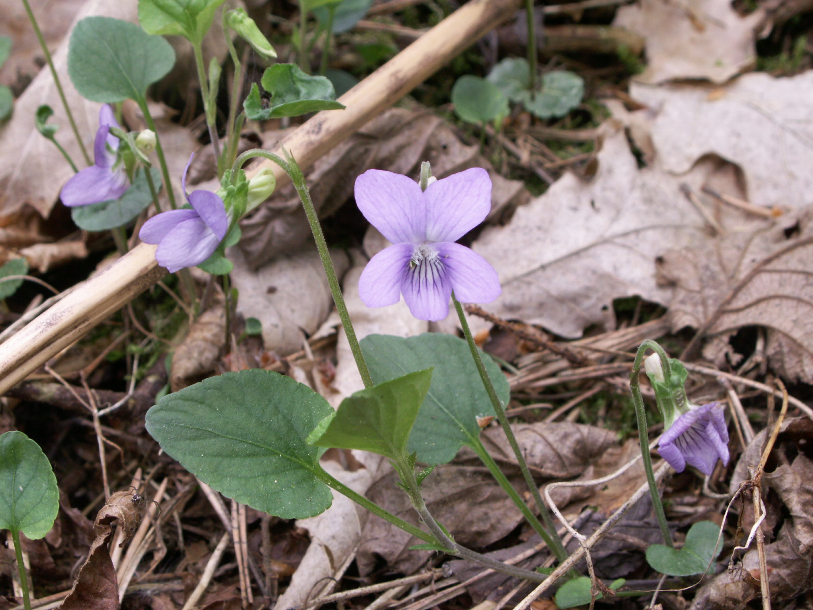 Viola canina plant